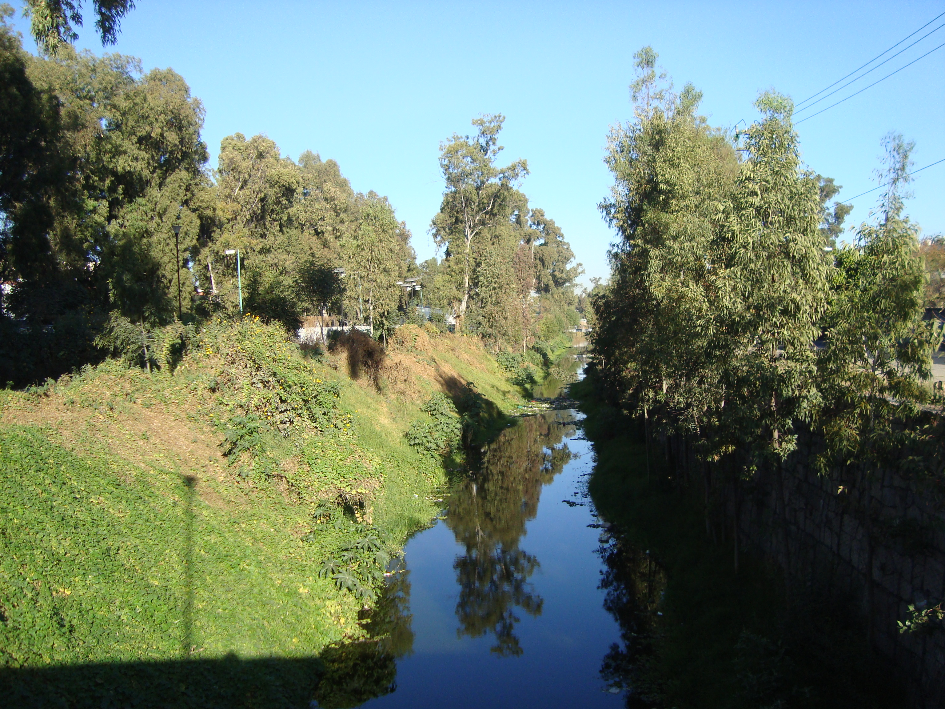 Vista del canal Nacional desde el puente del Toro del pueblo de San Andrés Tomatlán, en el límite entre las delegaciones de Iztapalapa y Coyoacán (Distrito Federal, México).